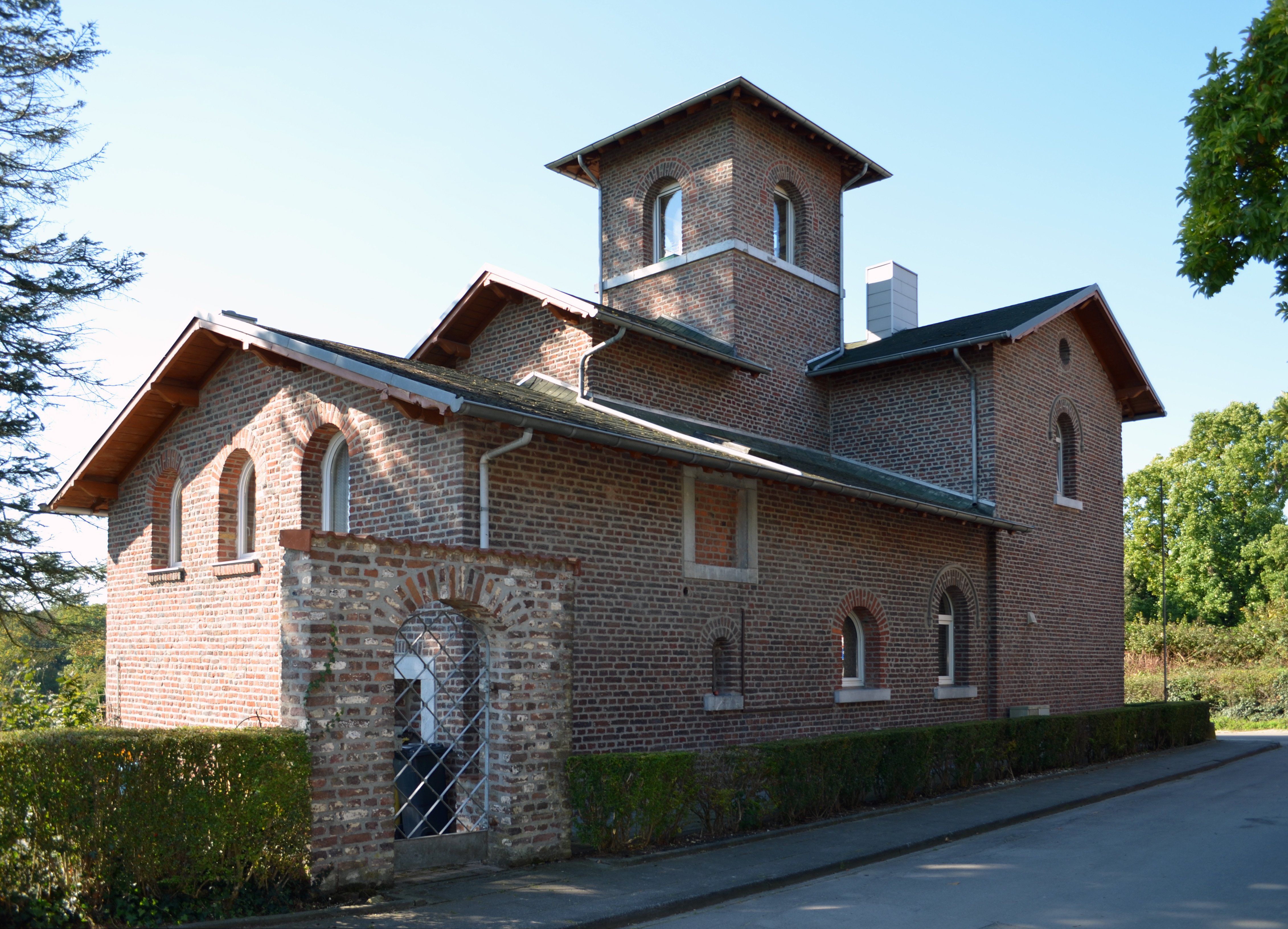 Ehemaliges Gärtnerhaus des Schlosses Berensberg in Herzogenrath-Kohlscheid